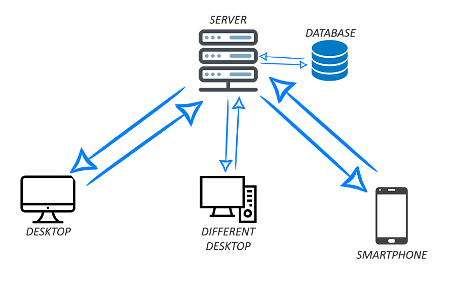 Modello semplice del CSA